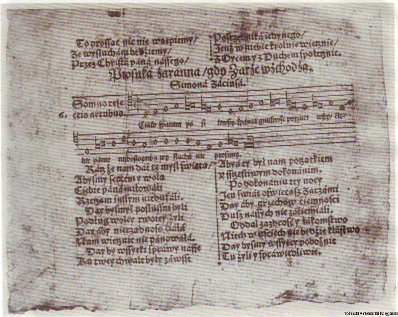 Песні хвал боскіх. 1558. Я. Зарэмба